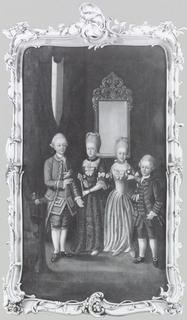 Portret van de kinderen van Daniël de Blocq van Haersma (1732-1814) en Maria Wybrandi (1734-1821). V.l.n.r. Arend Aulus van Haersma (1762-1803), Martha Cecilia van Haersma (1763-1809), Catharina van Haersma (1764-1827) en Sybrand van Haersma (1766-1839). Gesigneerd: Hauck et fils anno 1773.